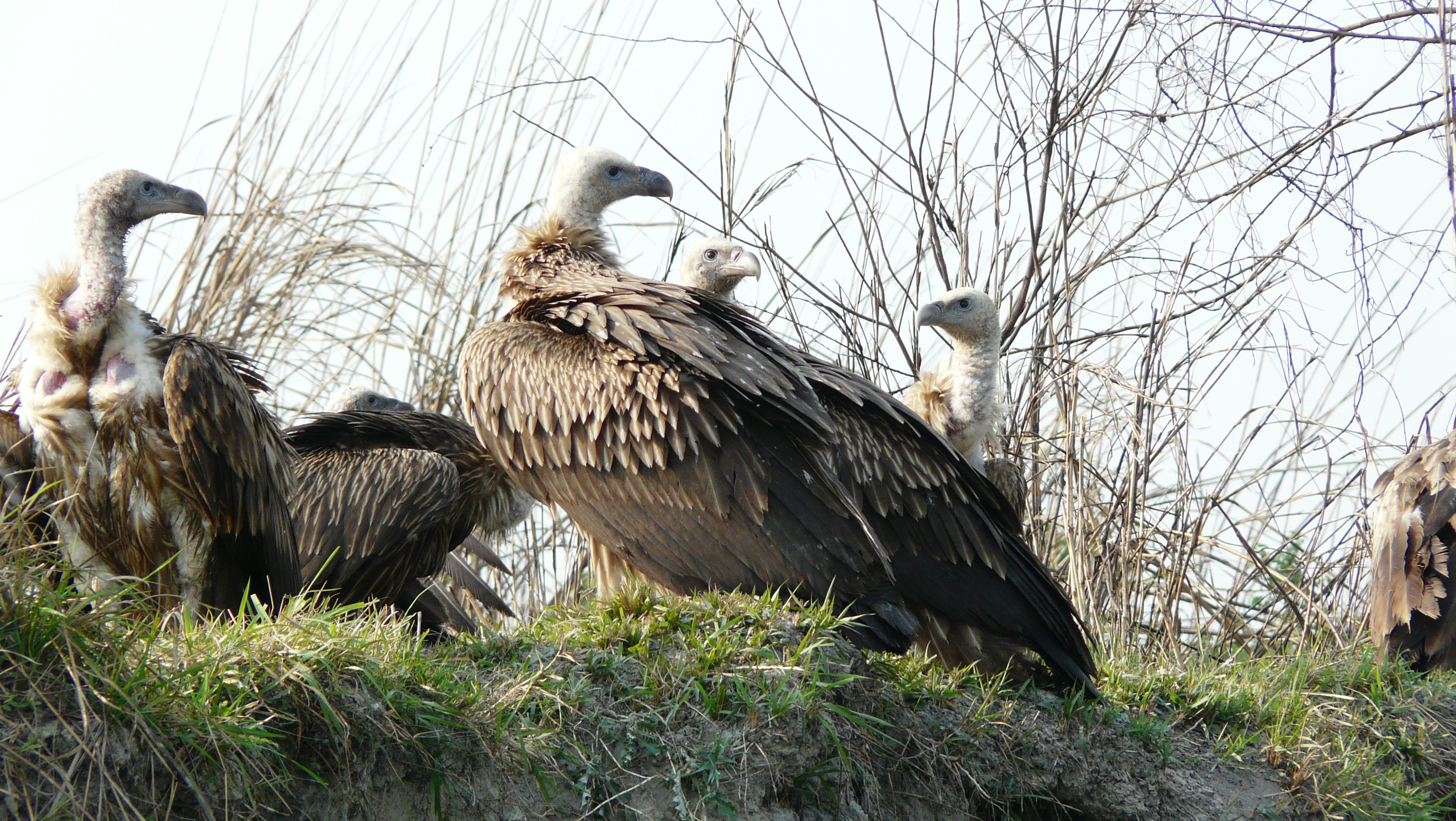 Himalayan Griffons. Gyps himalayensis